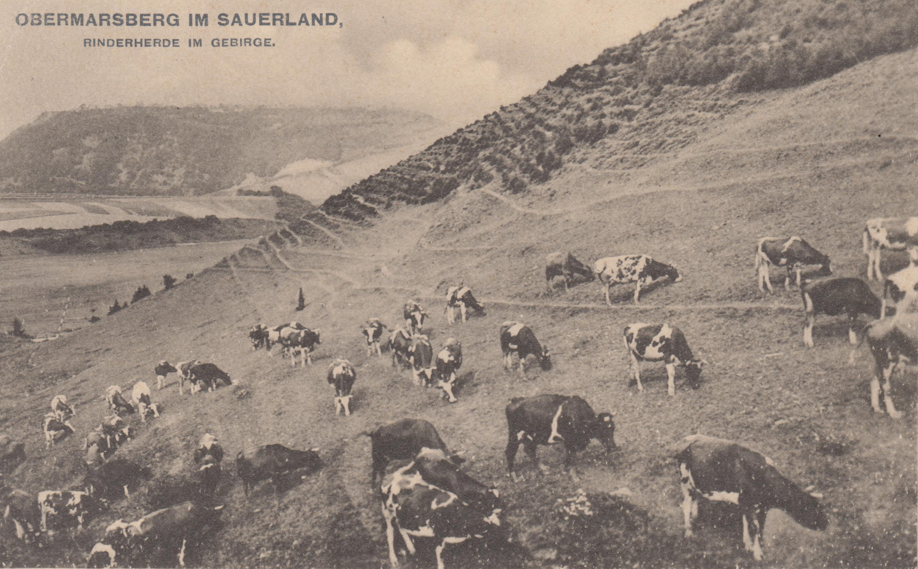 Anschitskarte aus dem Jahr 1910. Text auf Karte "Obermarsberg im Sauerland - Rinderherde im Gebirge". Bzeigt das heutige Naturschutzgebiet Auf der Wiemecke mit Rindern. Unten im Tal ist das Naturschutzgebiet Unteres Diemeltal und im Hintergrund das Naturschutzgebiet Hagen / Königsseite zu sehen .